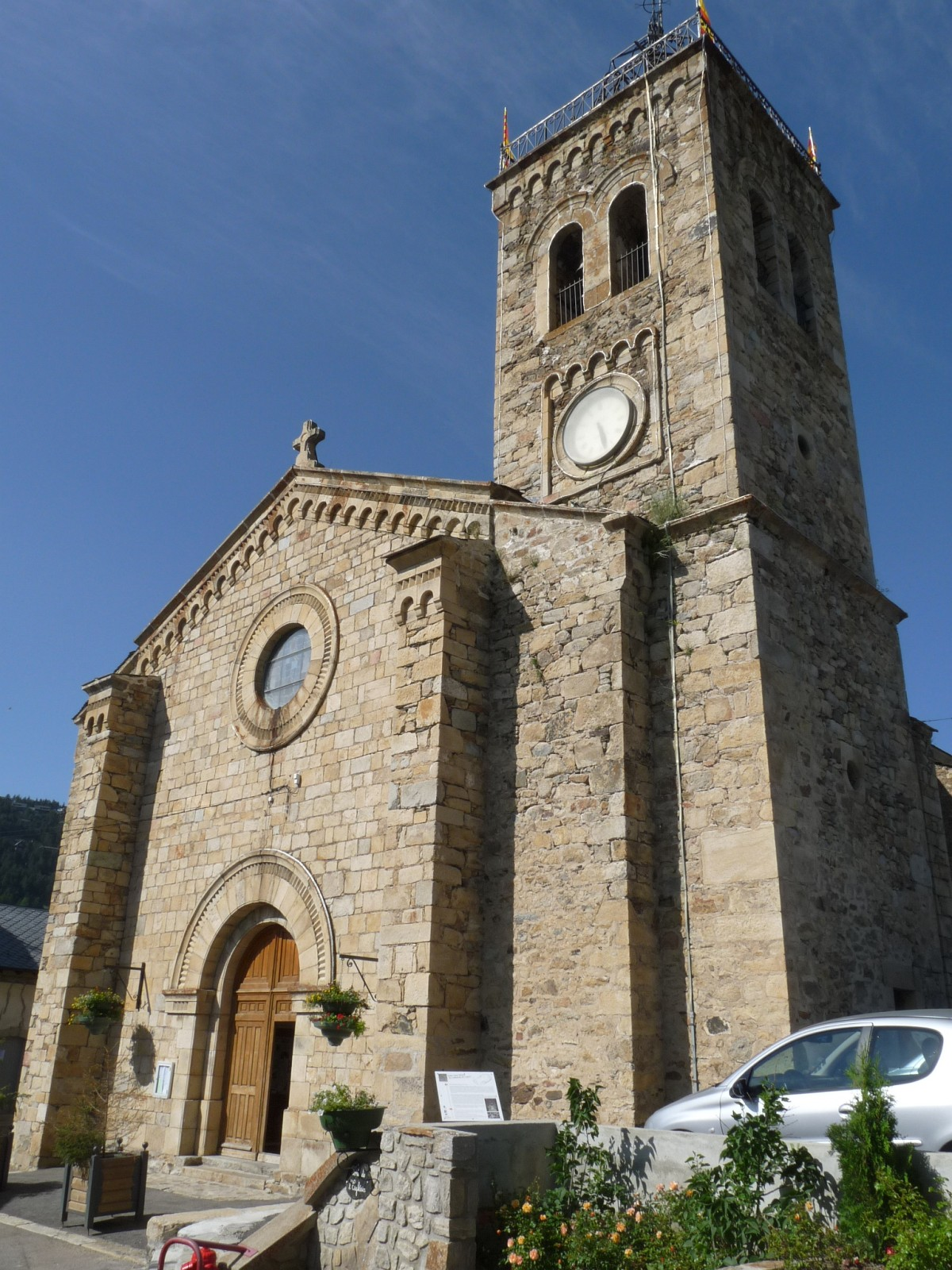 Eglise des Angles, Pyrénées-Orientales, France